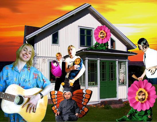 Don't be a stranger